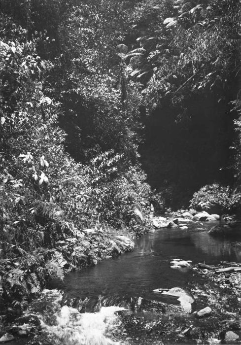 Foto. Oost-Java, de kloof van Oemboelan Soekapoera